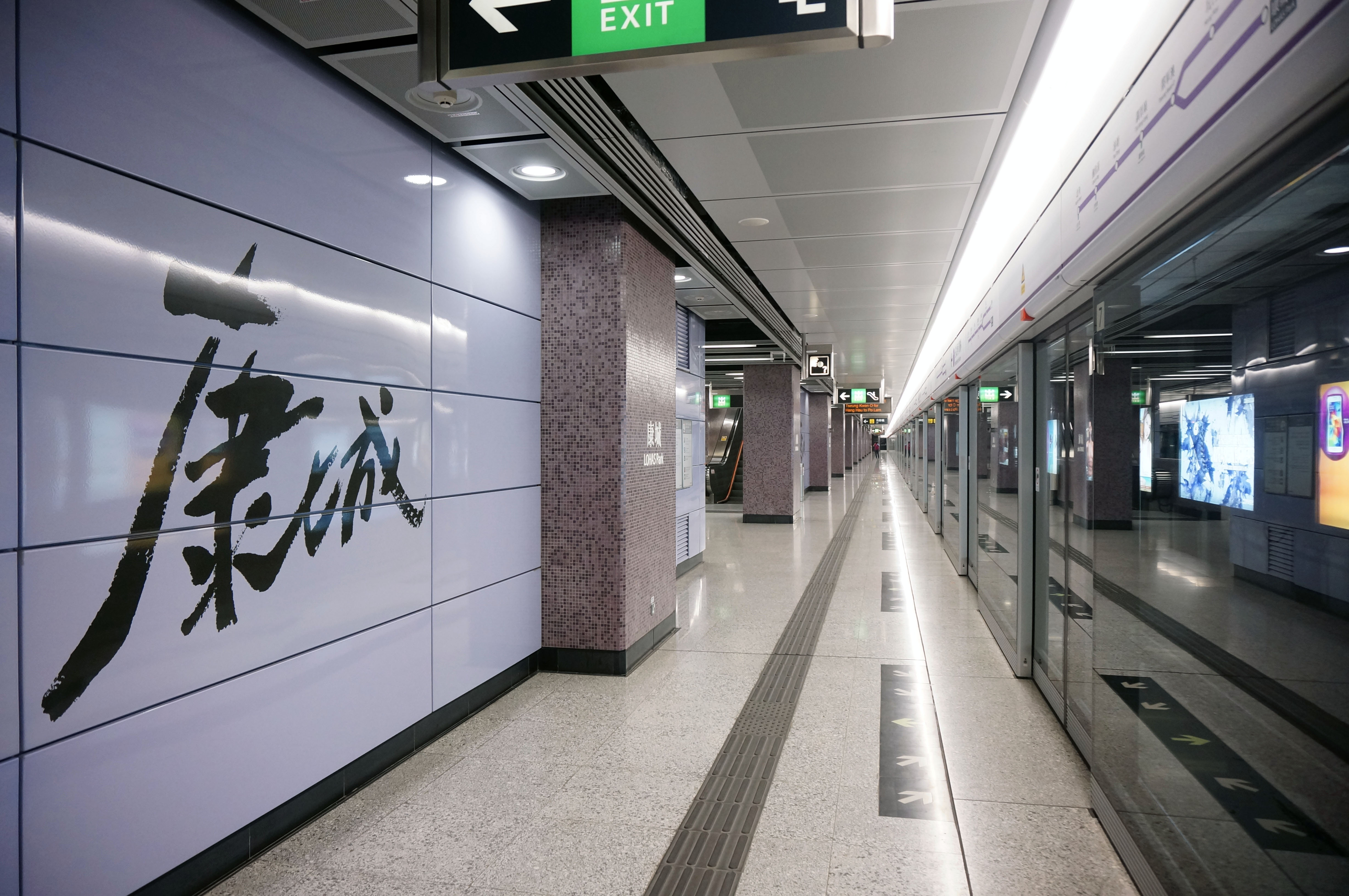 港鐵康城站月台